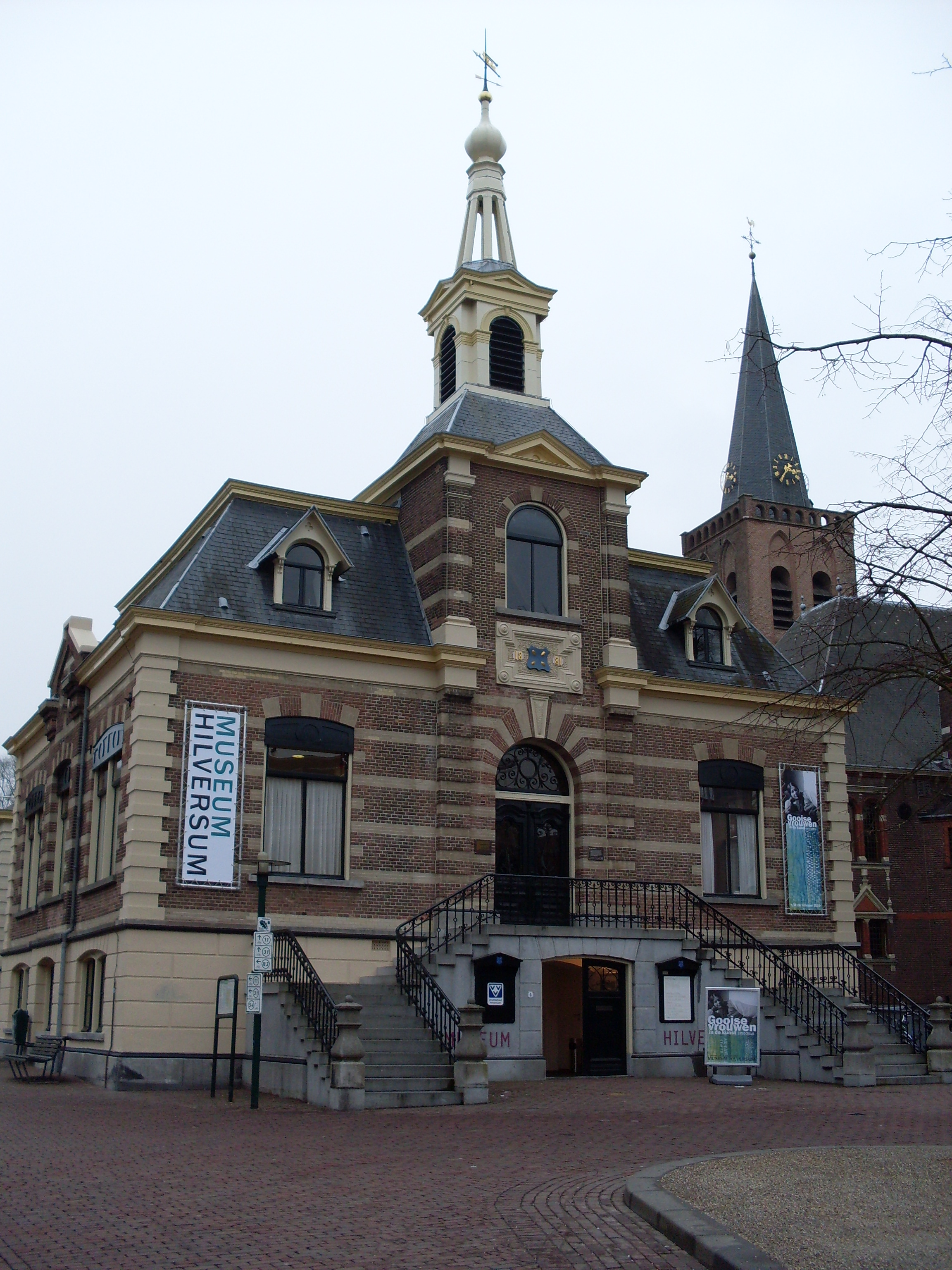 Voorm. Gemeentehuis (museum), kerkbrink 6, Hilversum.